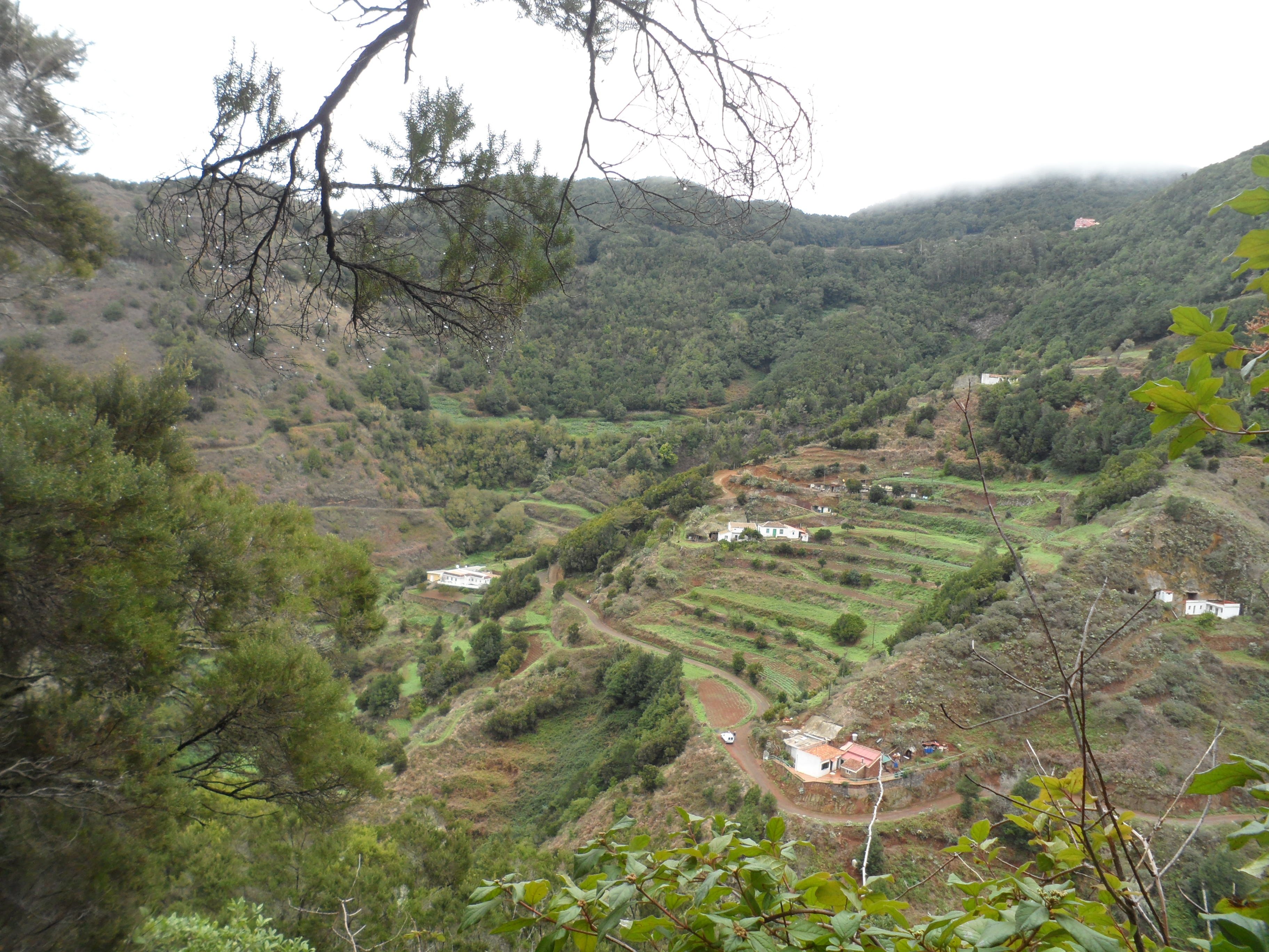 Camino por el sendero hacia el Batán